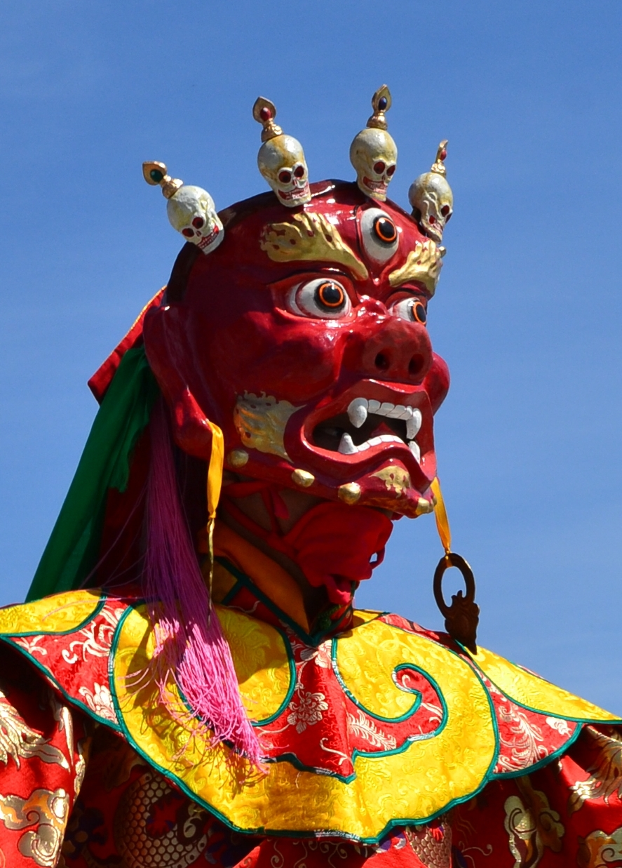 Мистерия Цам в дацане Хамбын Хурэ. Бурятия, Улан-Удэ